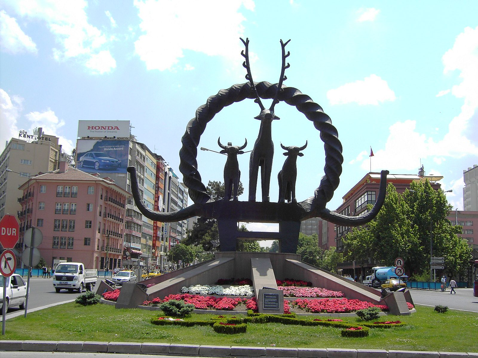 Ankara Sıhhıye Meydanı'ndaki Hatti Güneş Kursu Anıtı